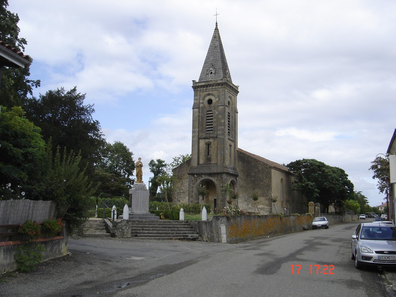 Église Saint-Pierre de Viella (France-Gers)